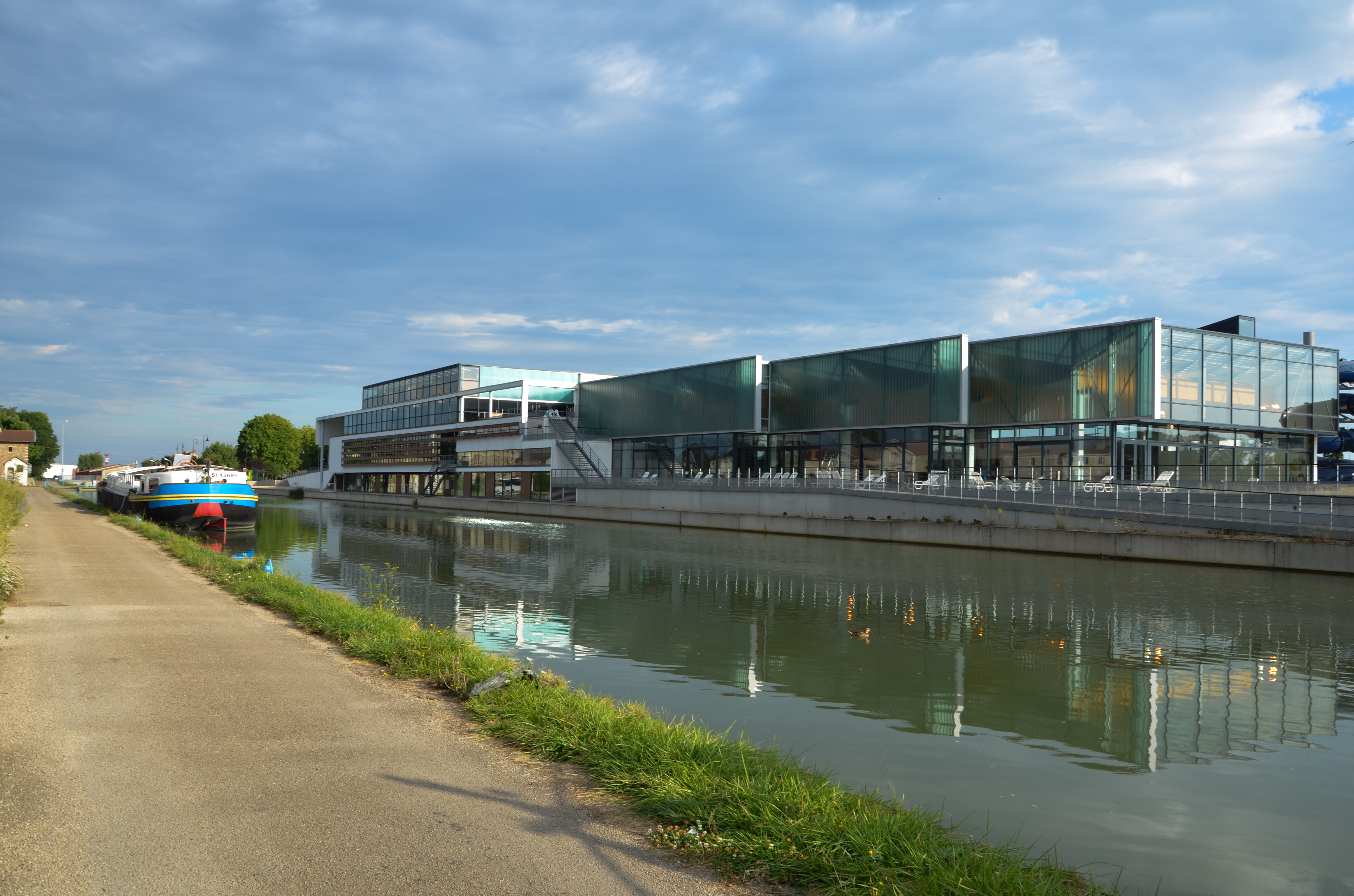 Piscine de St Dizier, Haute-Marne, France